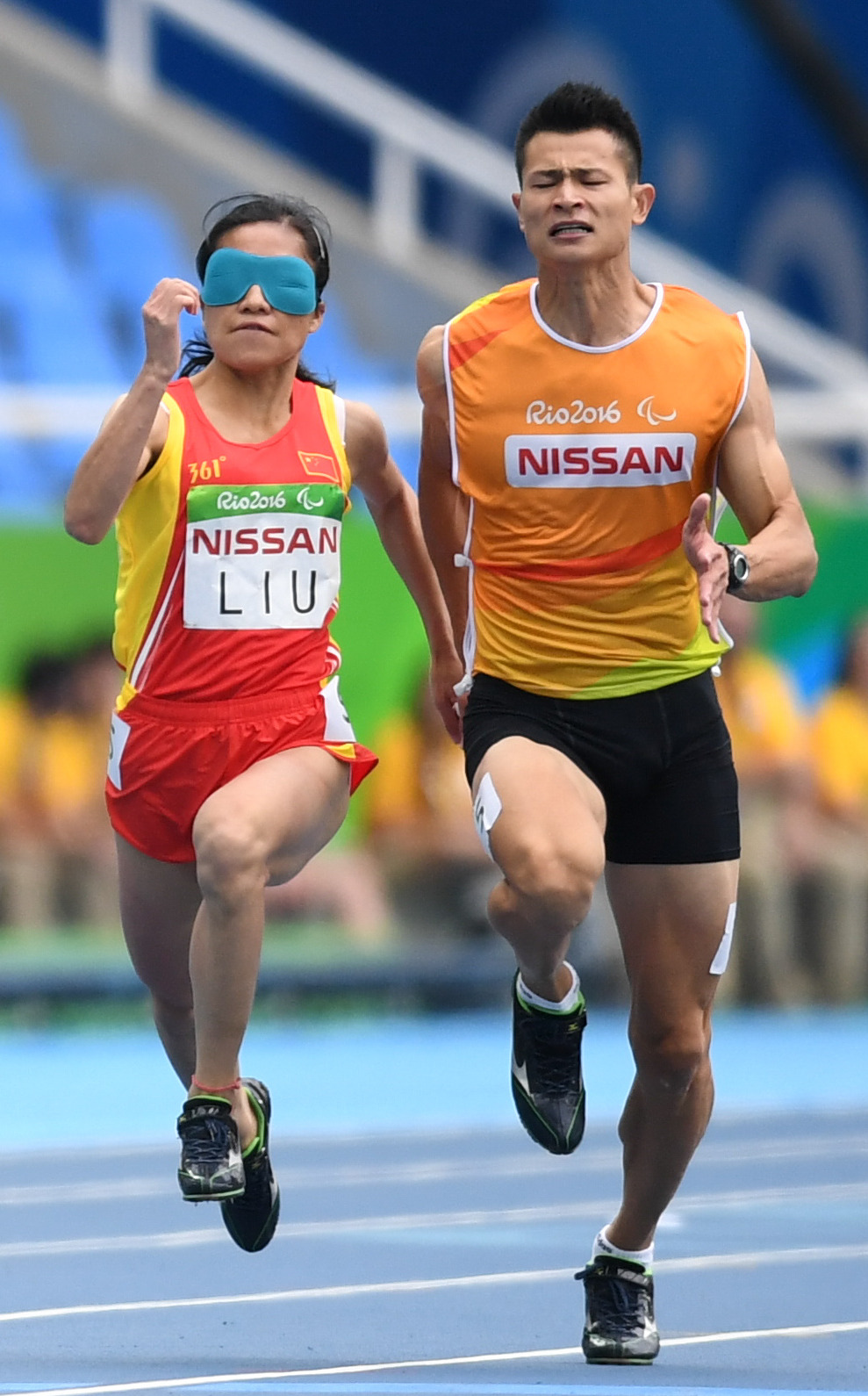 Rio de Janeiro - A brasileira Terezinha Guilhermina participa da prova feminina de 100 metros T11, no primeiro dia das provas de atletismo nos Jogos Paralímpicos Rio 2016 (Tânia Rêgo/Agência Brasil)